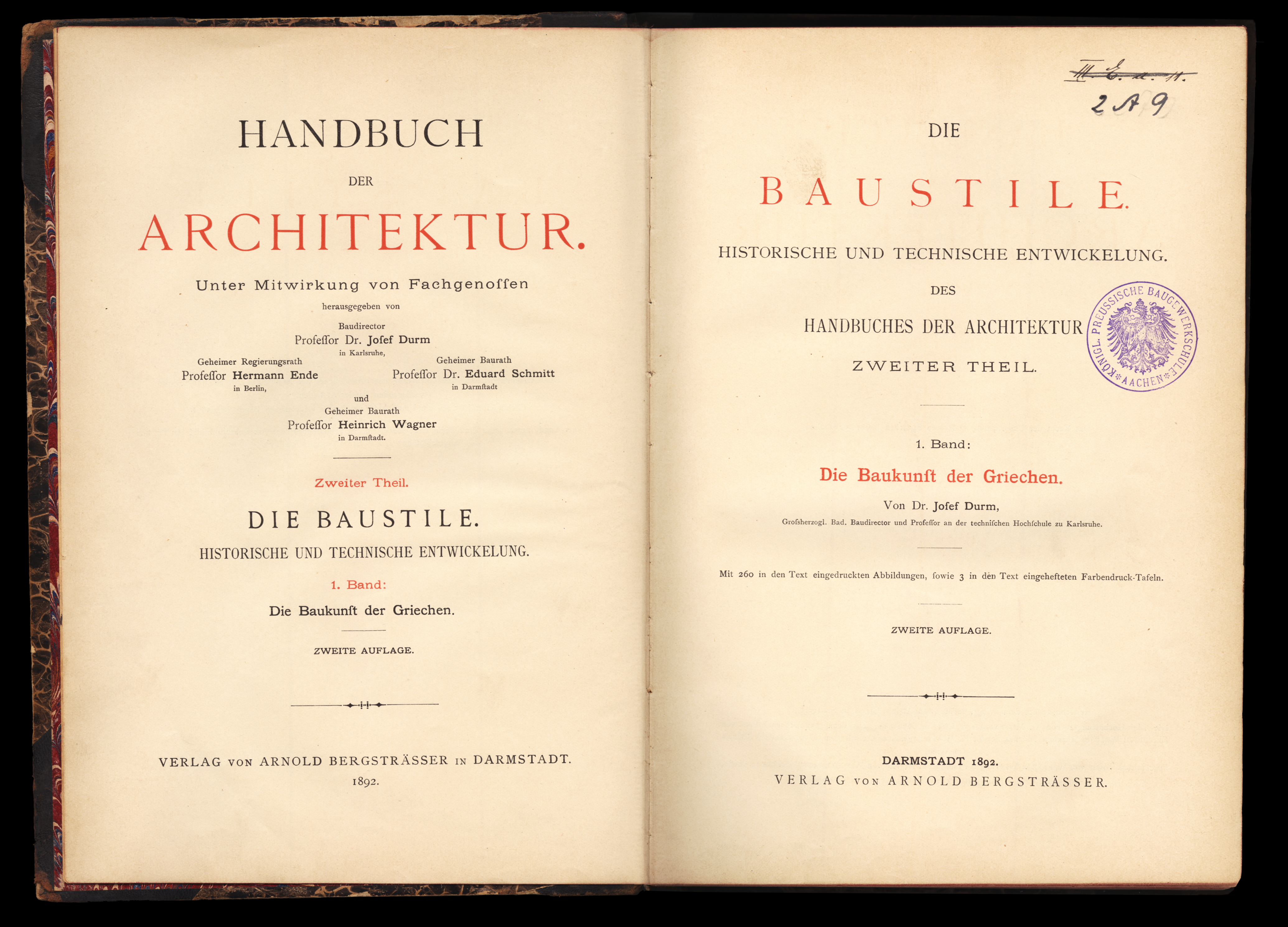 Frontispiz und Titelblatt aus: Handbuch der Architektur. II. Theil: Die Baustile. Historische und technische Entwicklung. 1. Band: Josef Durm: Die Baukunst der Griechen. Darmstadt 1881. 2. Aufl. Darmstadt 1892.